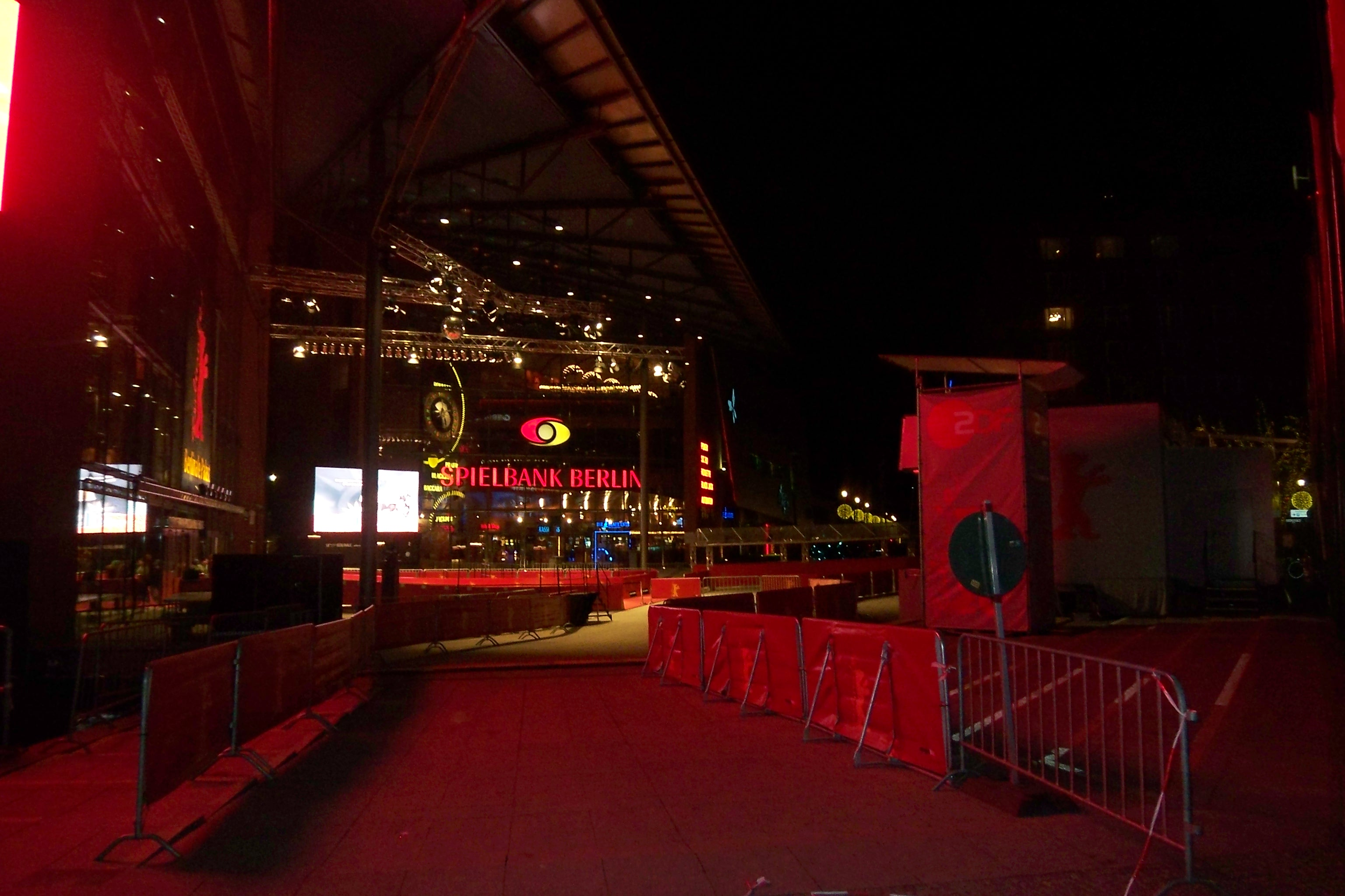 Spielbank Berlin (Bildmitte) und Berlinale-Palast (links) am Abend mit den "Überresten" der 58. Berlinale